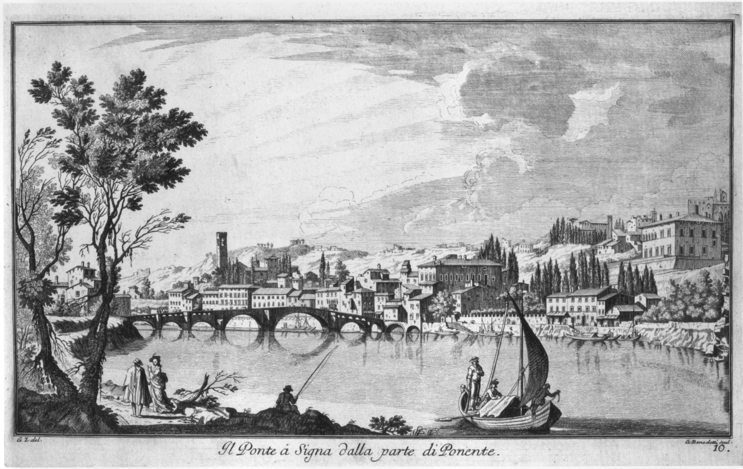 Zocchi, ville 12 ponte di signa da ponente